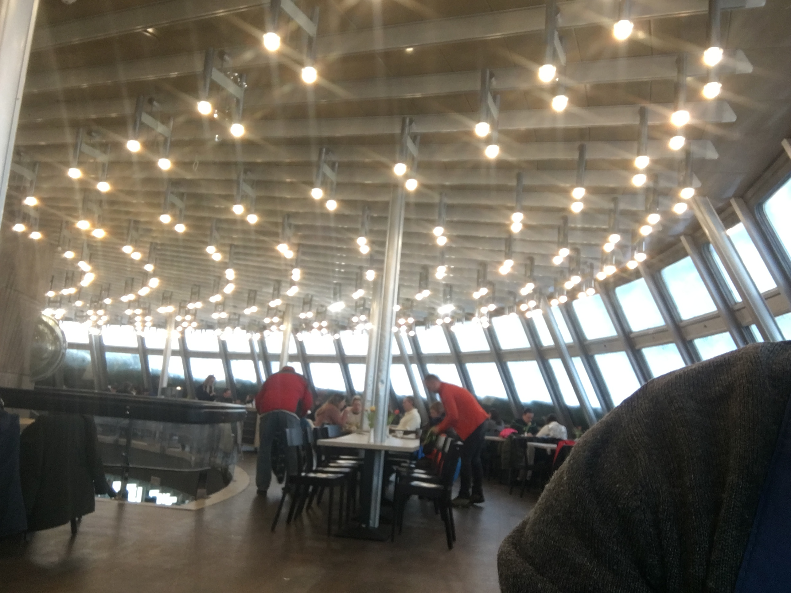 foto Rafal BAJENA - wnętrze wieży JESTED